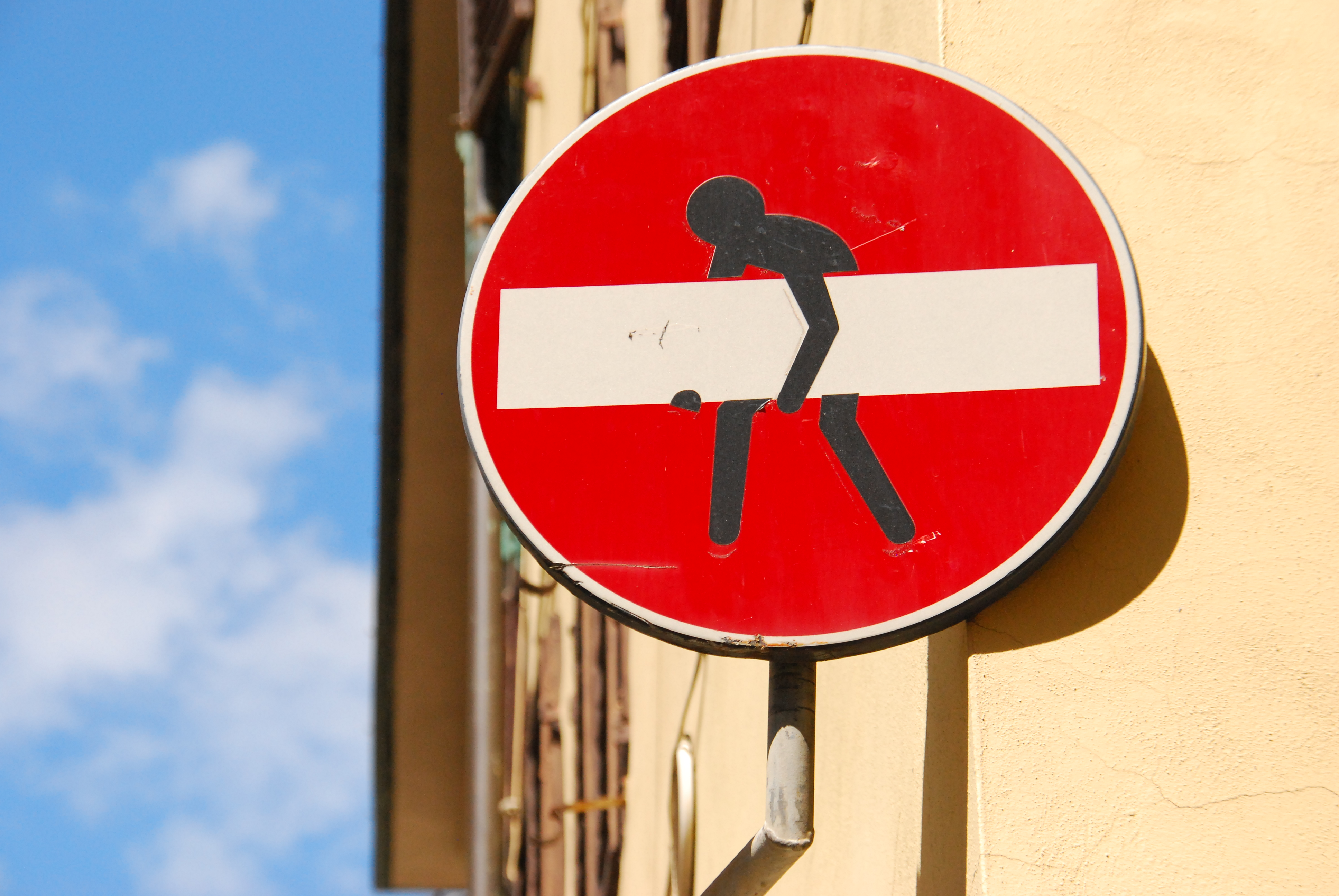 Intervenció artística de Clet Abraham en un senyal de tràfic a Florència